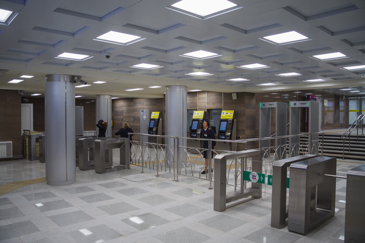 Кассово-турникетный зал станции «Дубравная» Казанского метрополитена